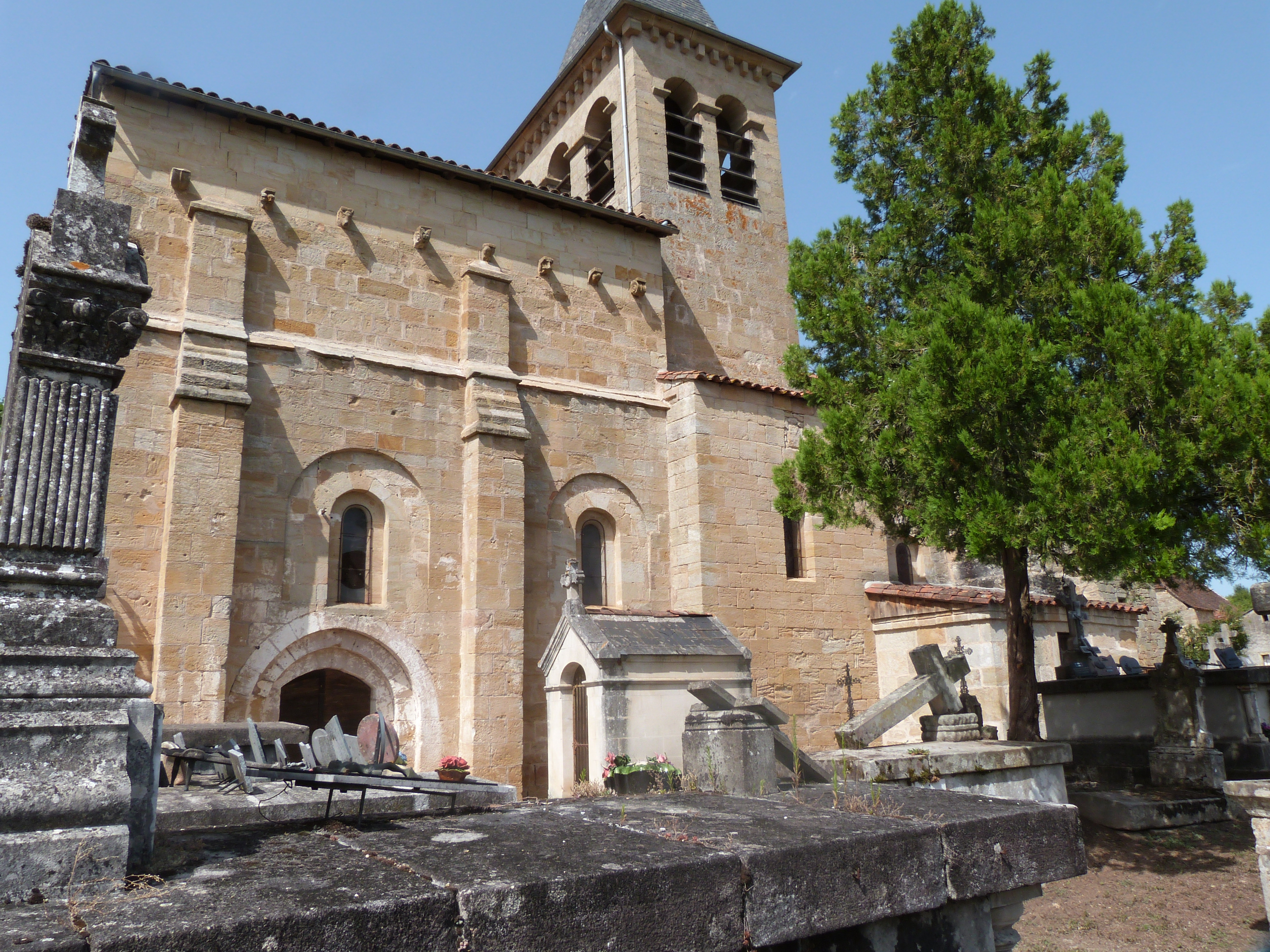 Église Saint-Pierre de Fourmagnac (Inscrit) .